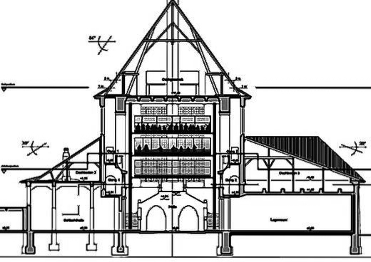 Haus-in-Haus-Lösung (Büros in drei Geschossen) als Möglichkeit zur Umnutzung des ehemaligen Schlachthofes in Bad Kissingen